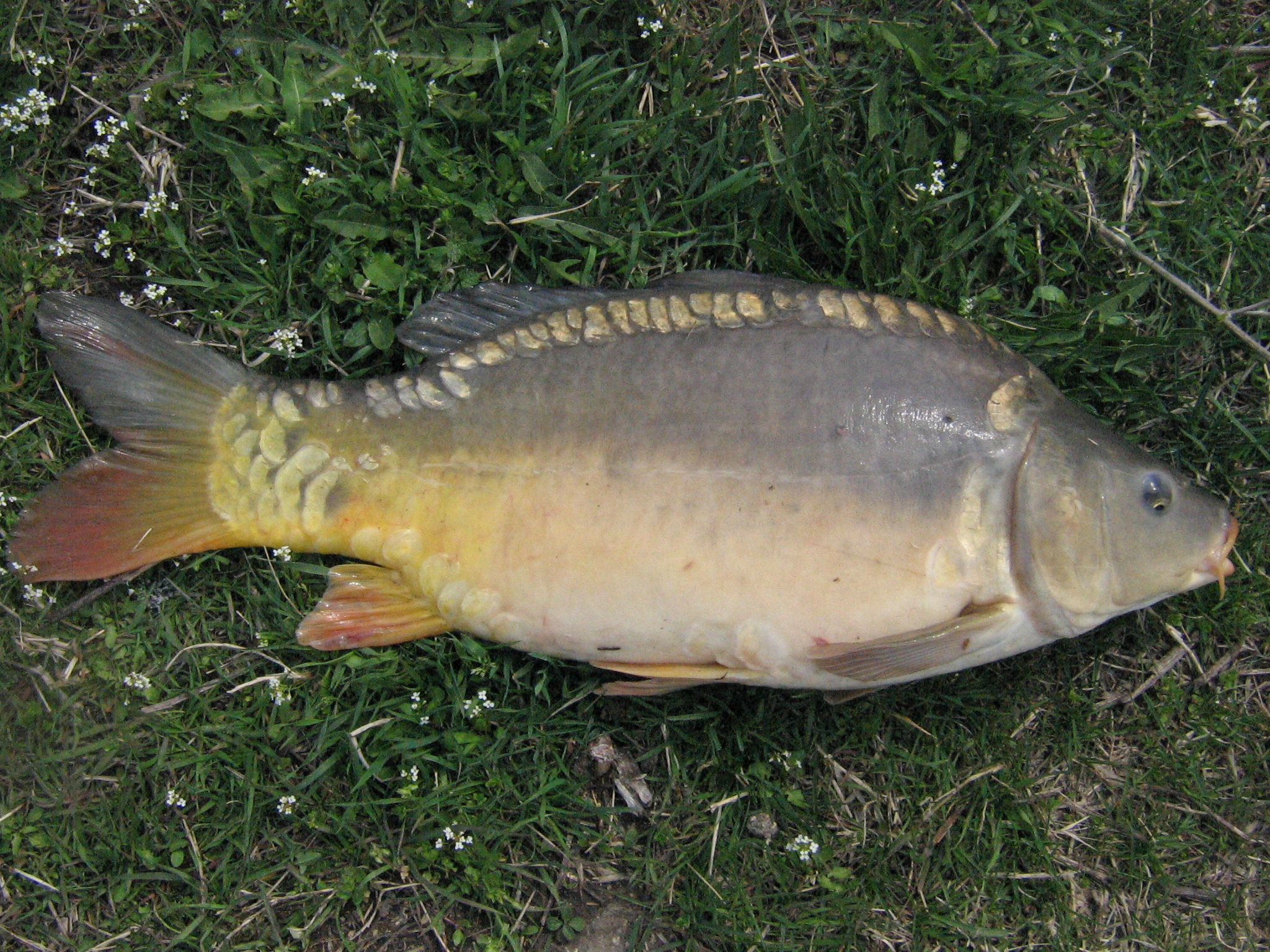 Огледален шаран - "Пловдив"